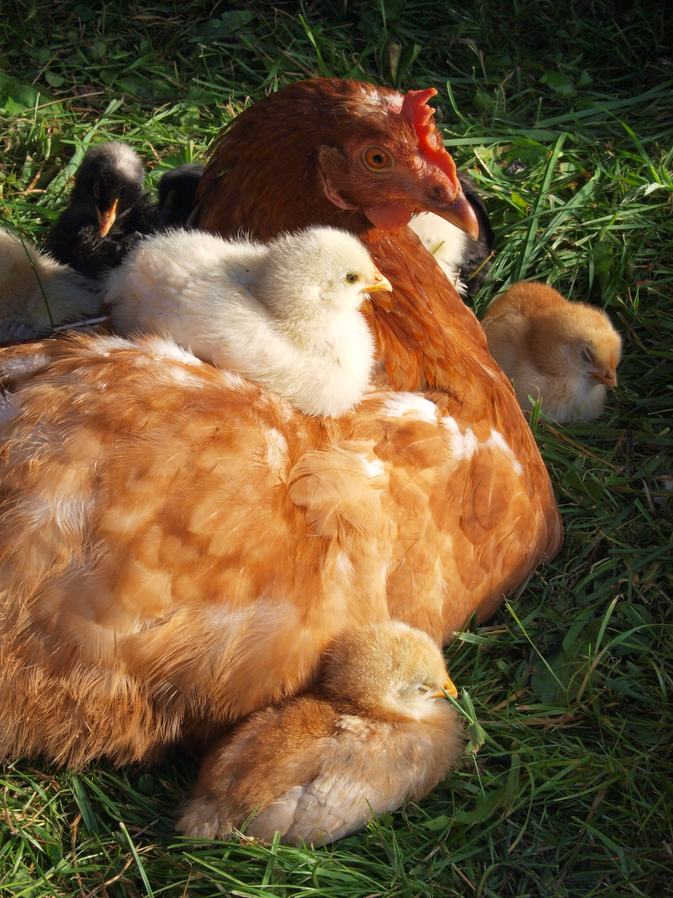 Kodukana enda poegadega.